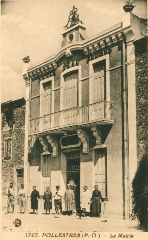 L'ancienne mairie de Pollestres